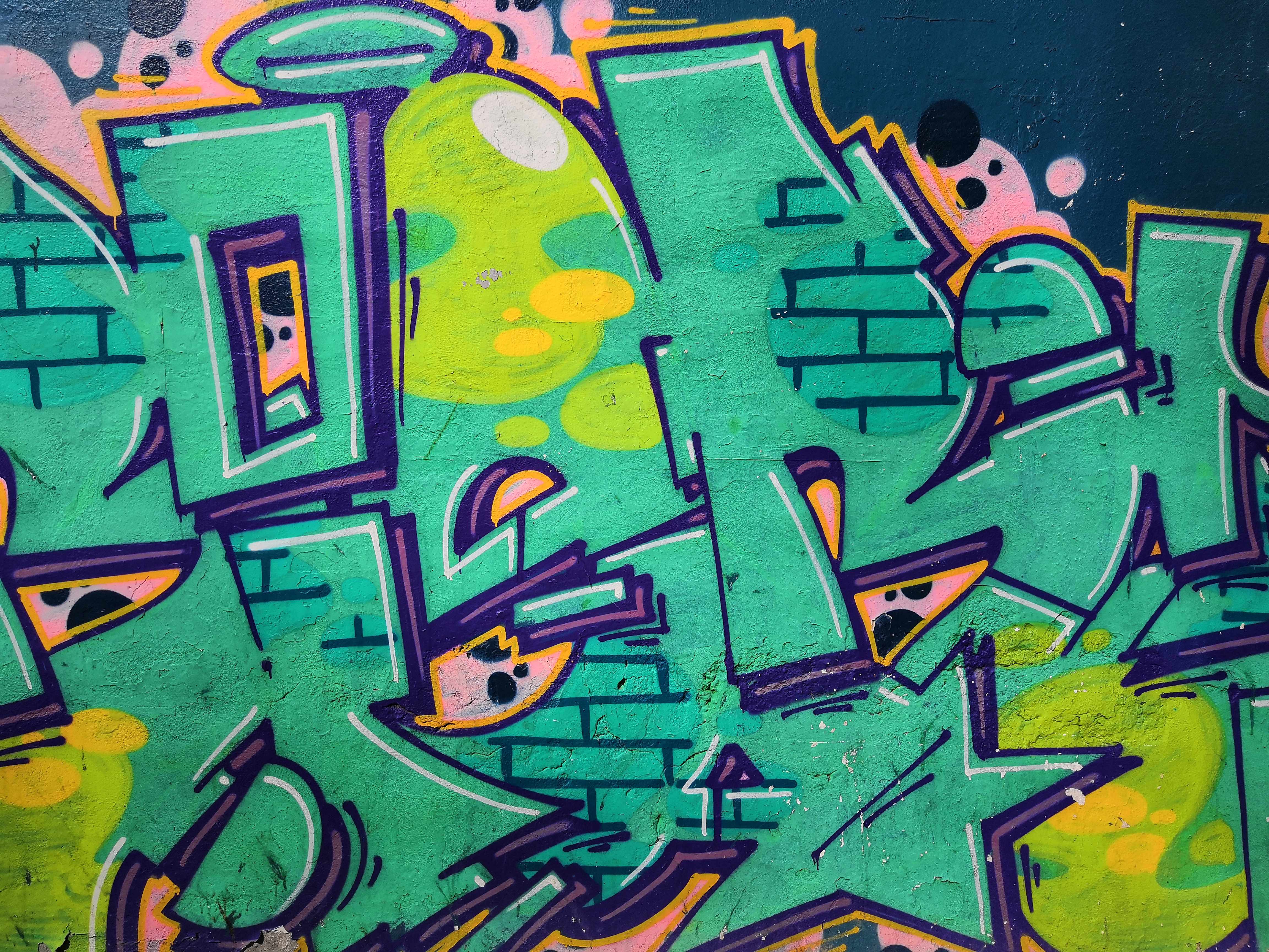 Modragon/Arrasate herrian dagoen graffiti ederra.